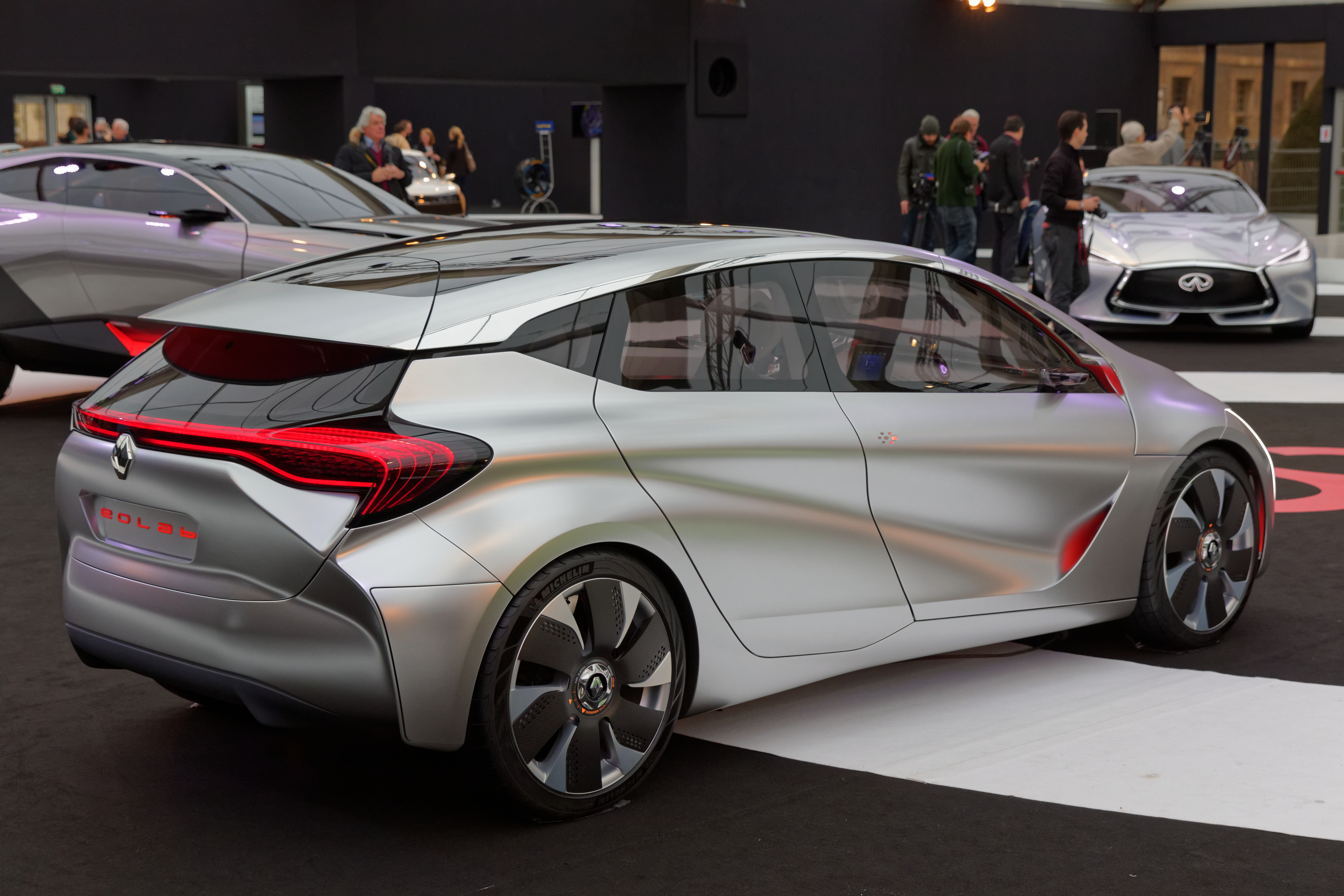 La Renault Eolab exposée lors du festival automobile international 2015.